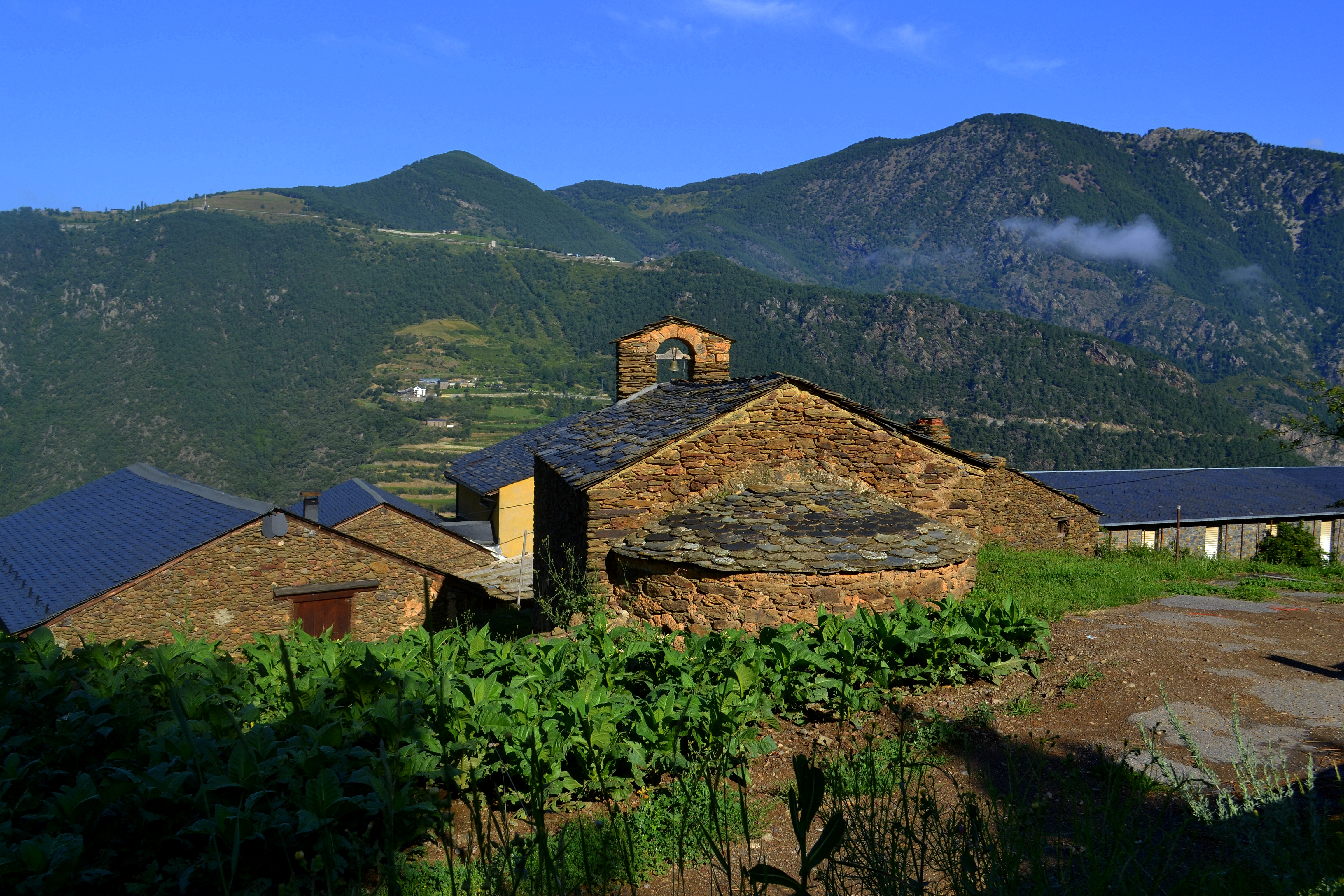 Vedat d'Enclar This is a a photo of a natural area in Andorra with id: AD-VCE